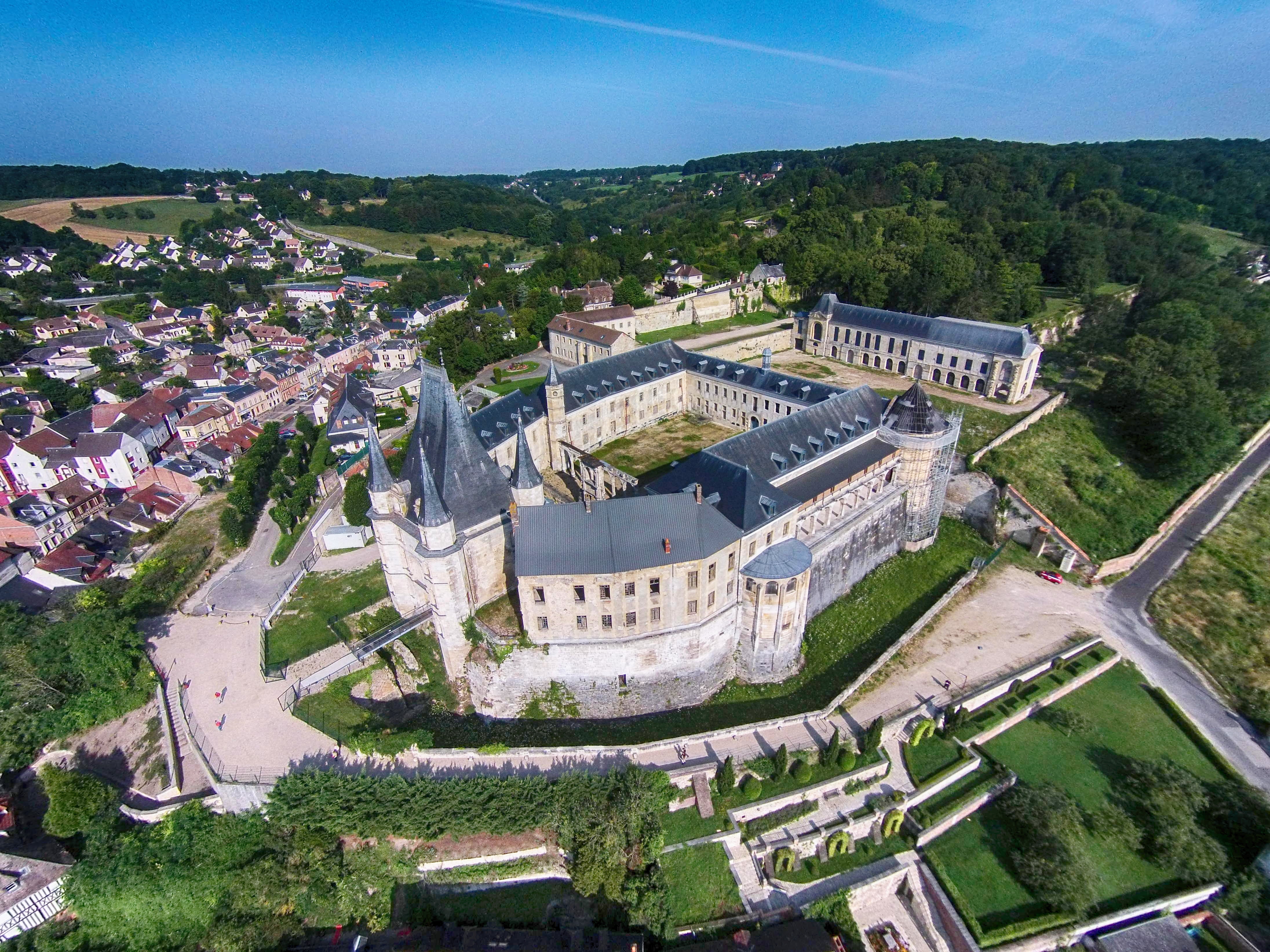 Château de Gaillon, Gaillon, Eure, Normandie